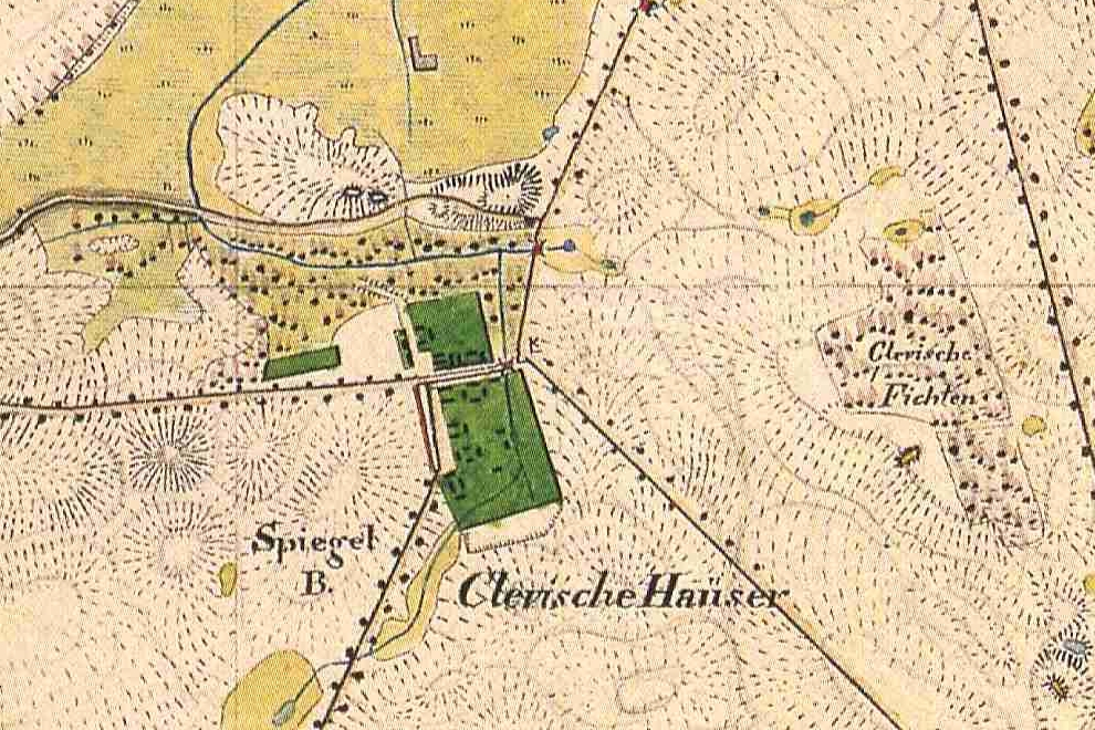 Karte von Klevesche Häuser, Kreis Ruppin, Provinz Brandenburg, 1825